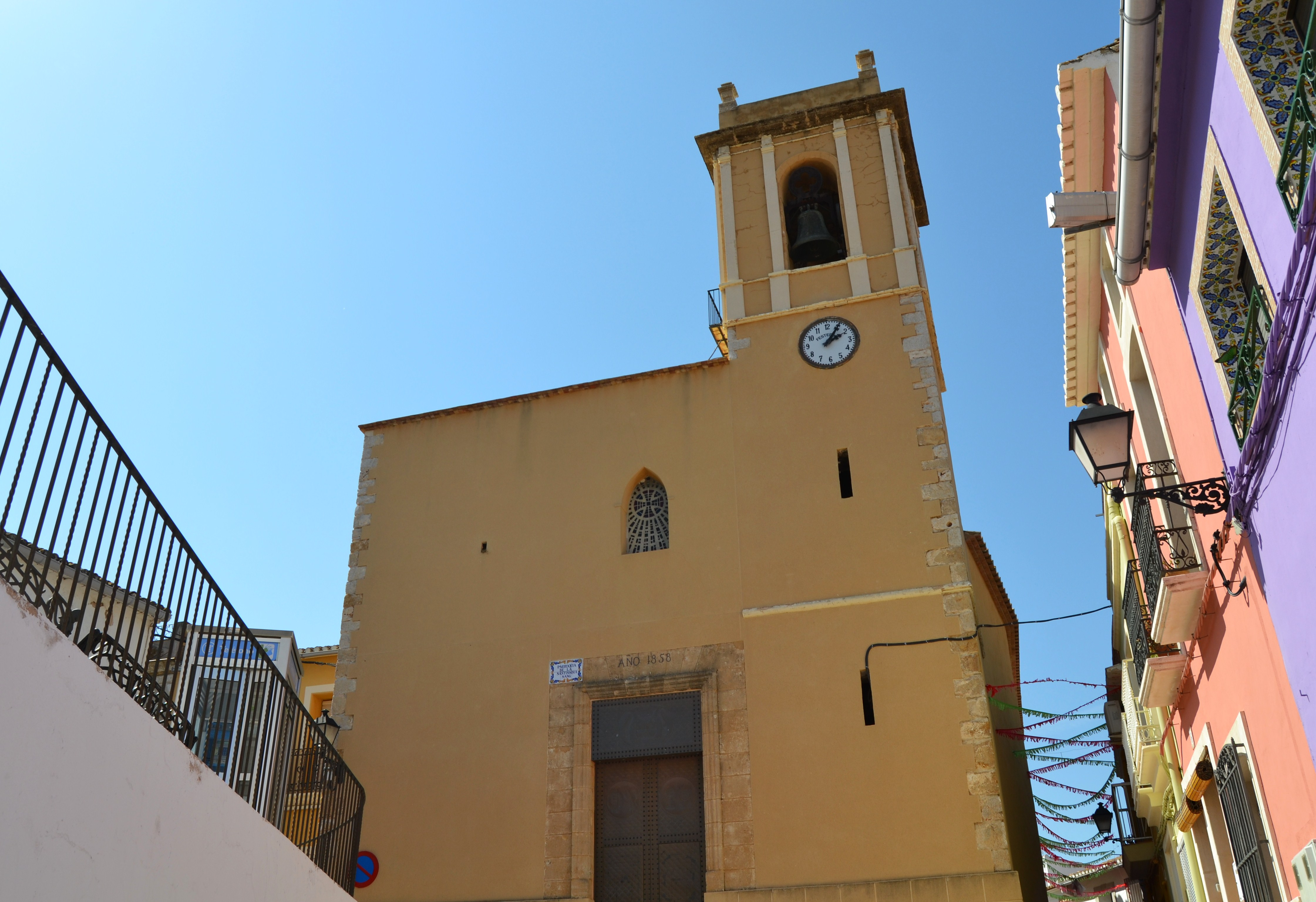 Benidoleig, església de la santíssima Sang. 30.030-002.